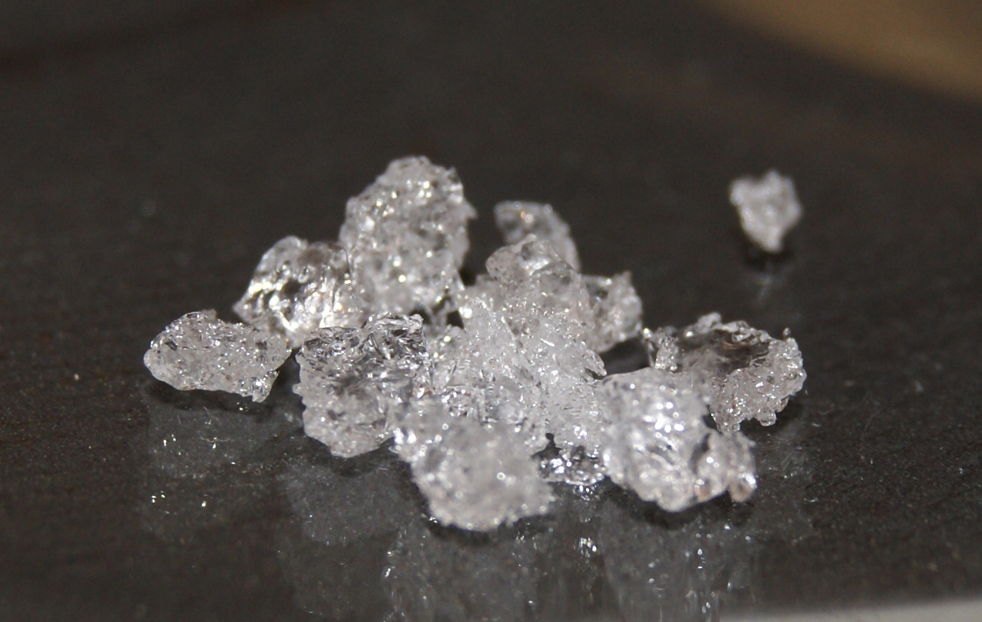 Chloralhydrat